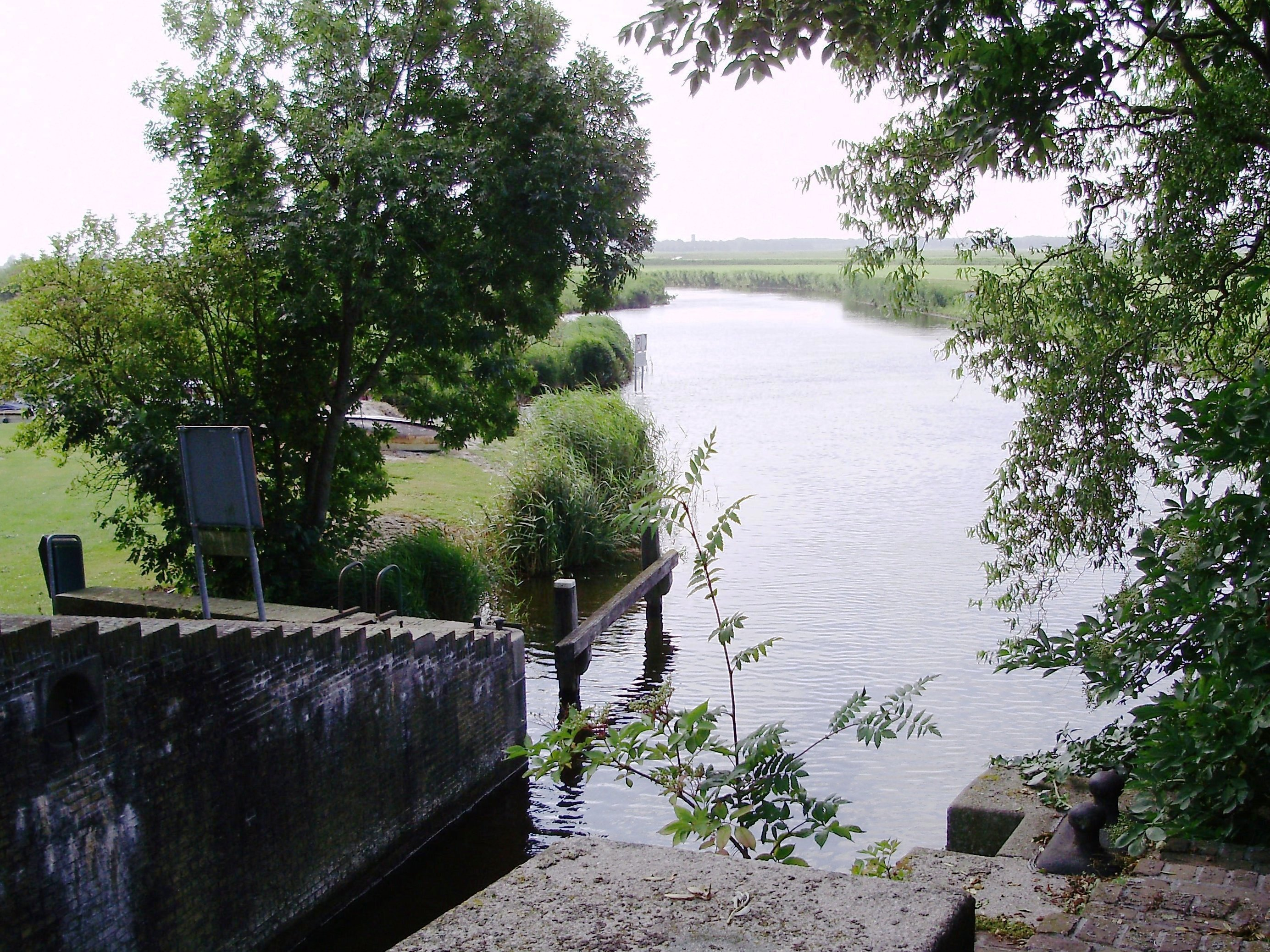 De Bij of Tusschenlinde bij Schoterzijl, Friesland